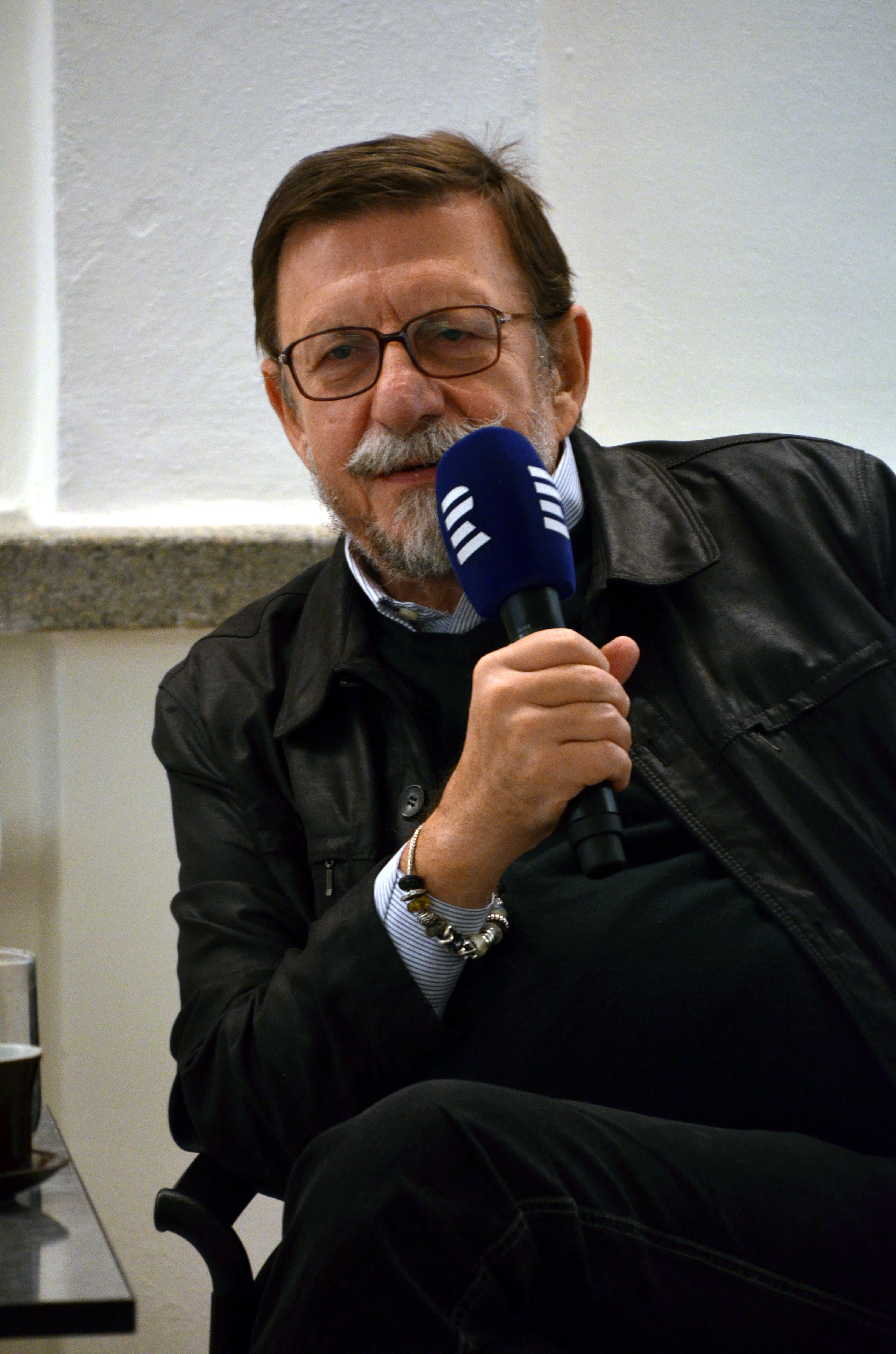 Josef Veselý při besedě k pořadu Toulky českou historií v Adamově